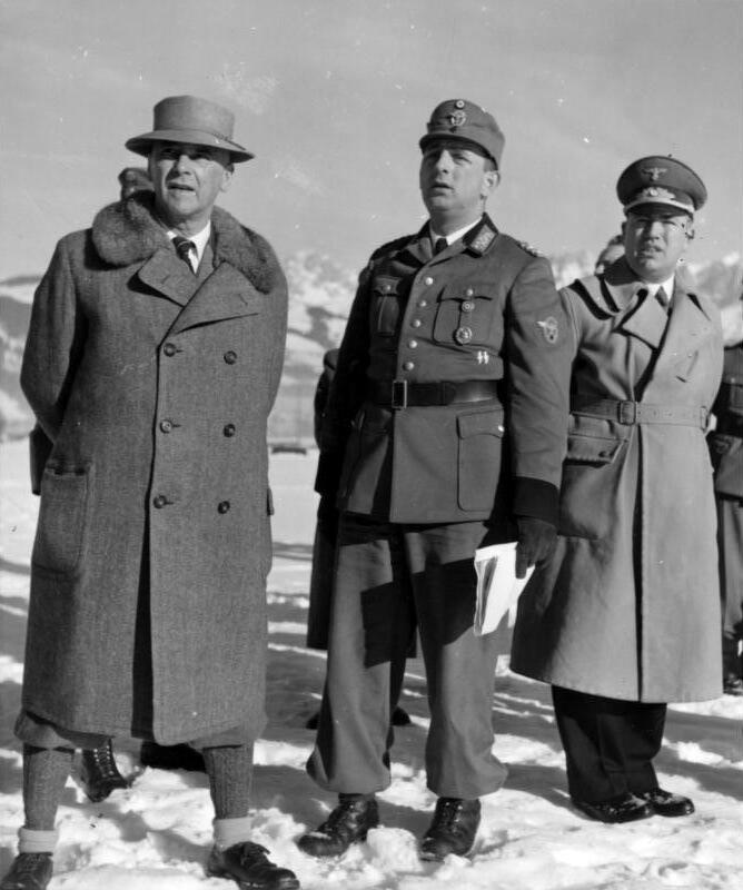 Reichs-Min. Dr. Frick, Gen. Daluege, und Gauleiter Hofer auf dem Schieß-Stand